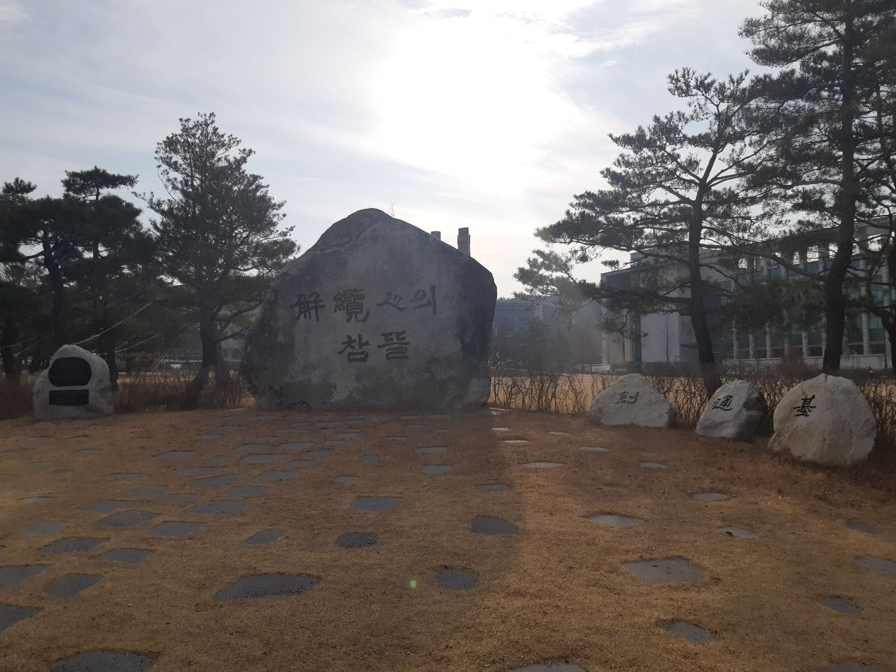 강ㄹ으원주대학교 해람인의 참뜰 비석